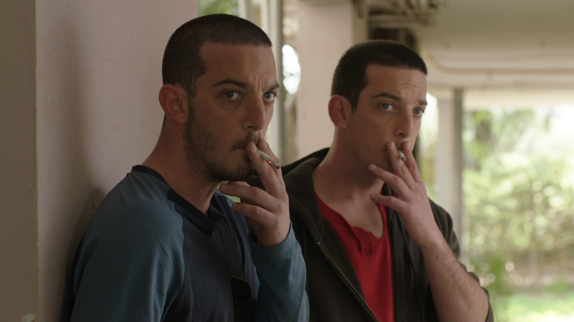 איתן ודוד קוניו בסרטו של תום שובל "פתח תקוה", 2013